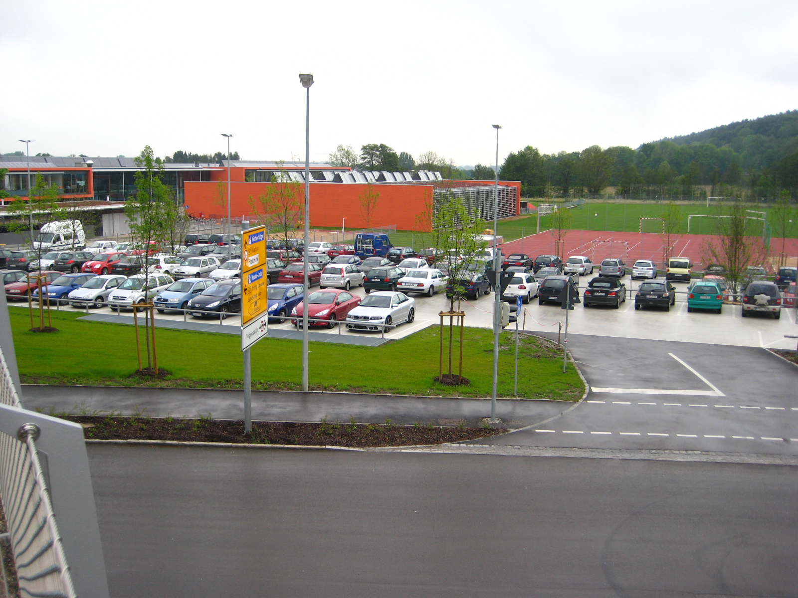 Von der neuen Fußgängerbrücke aufgenommen. Das Schulzentrum für das Graf-Rasso-Gymn. und die FOS/BOS